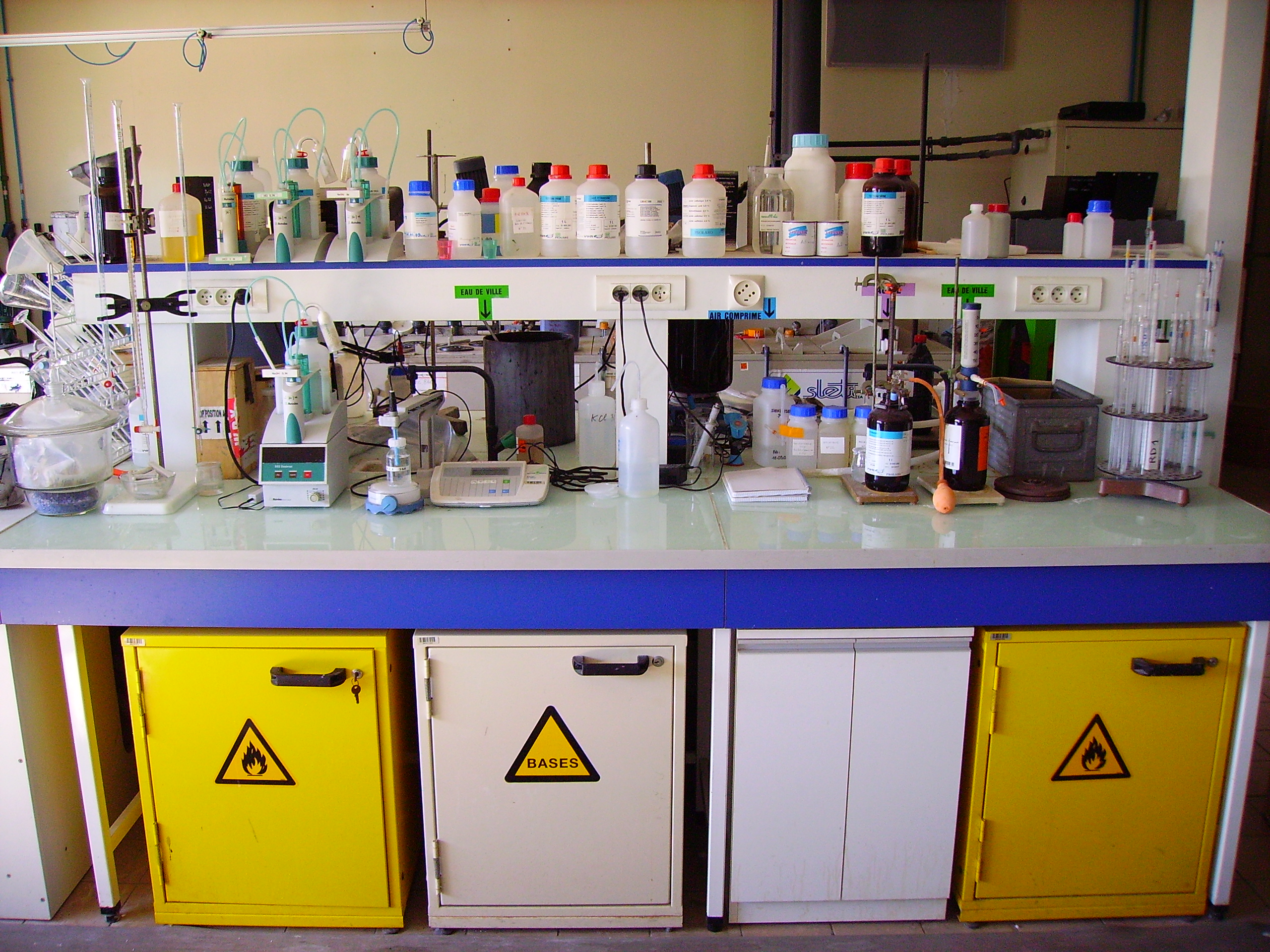 Paillasse et sa verrerie d'un laboratoire de chimie analytique (mesures par pH-métrie et titrimétrie volumétrique) jouxtant un laboratoire de traitement de surface (TTS). Une paillasse équipée